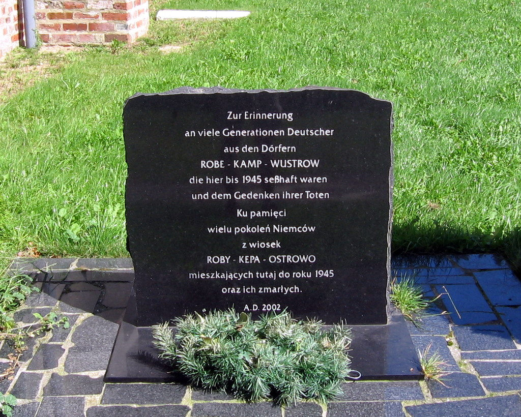 Tablica pamiątkowa przy Kościele pw. Niepokalanego Serca NMP w Robach, zachodniopomorskie